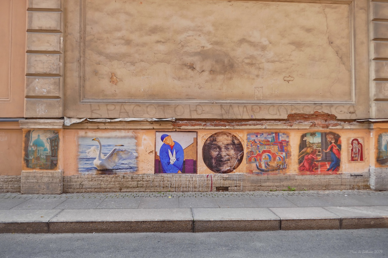 Галерея Урбанфреска